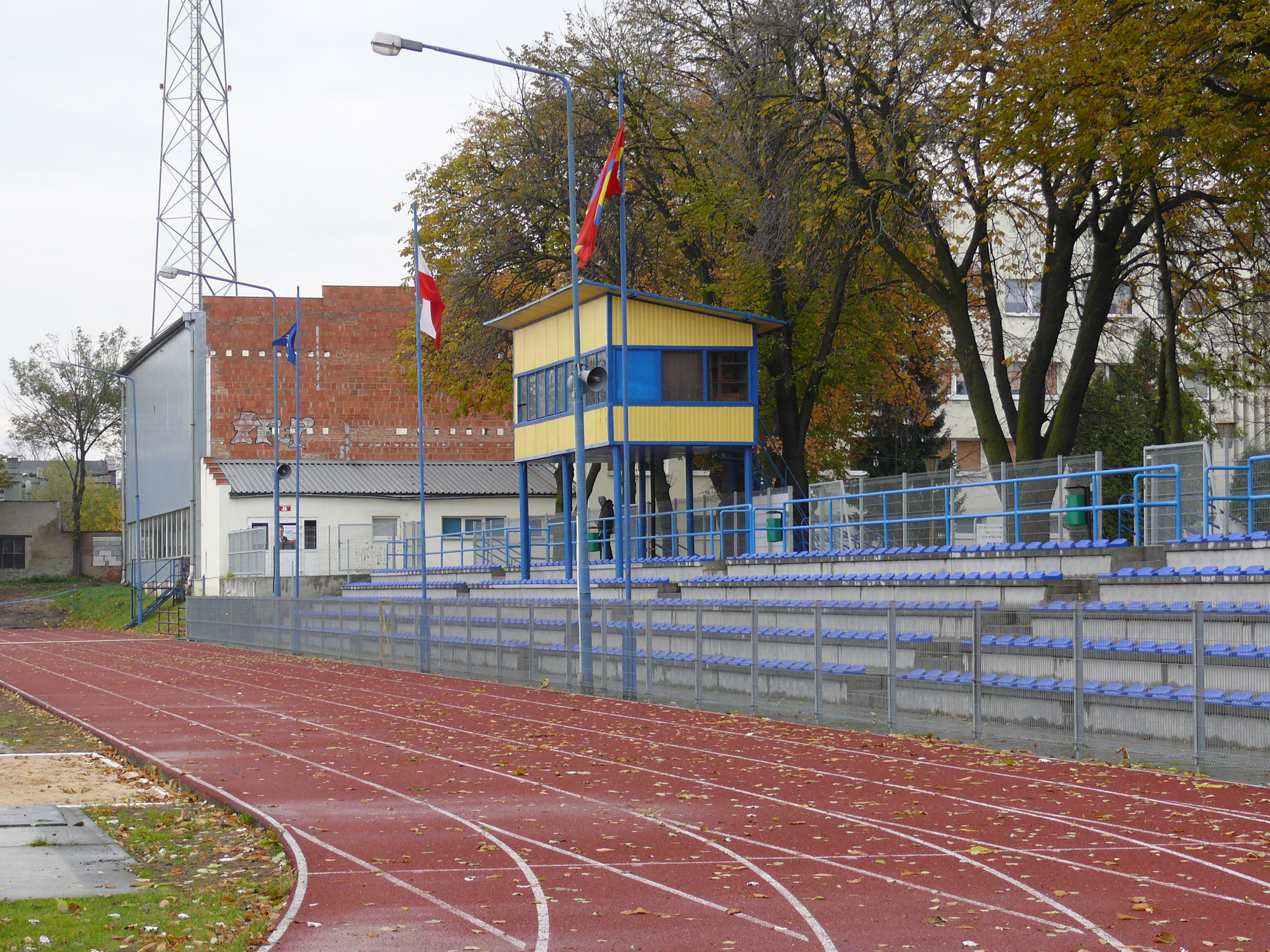 stadion miejski przy ul. Kusocińskiego w Ostrowie Wlkp.